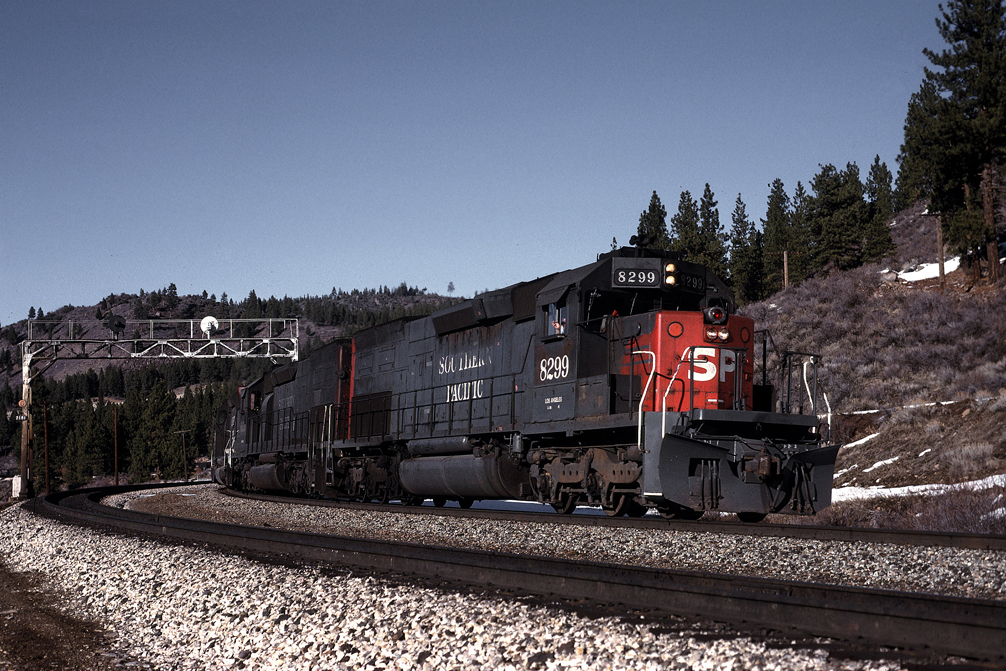 SP 8299 EB At Hirschdale Feb 88xRP